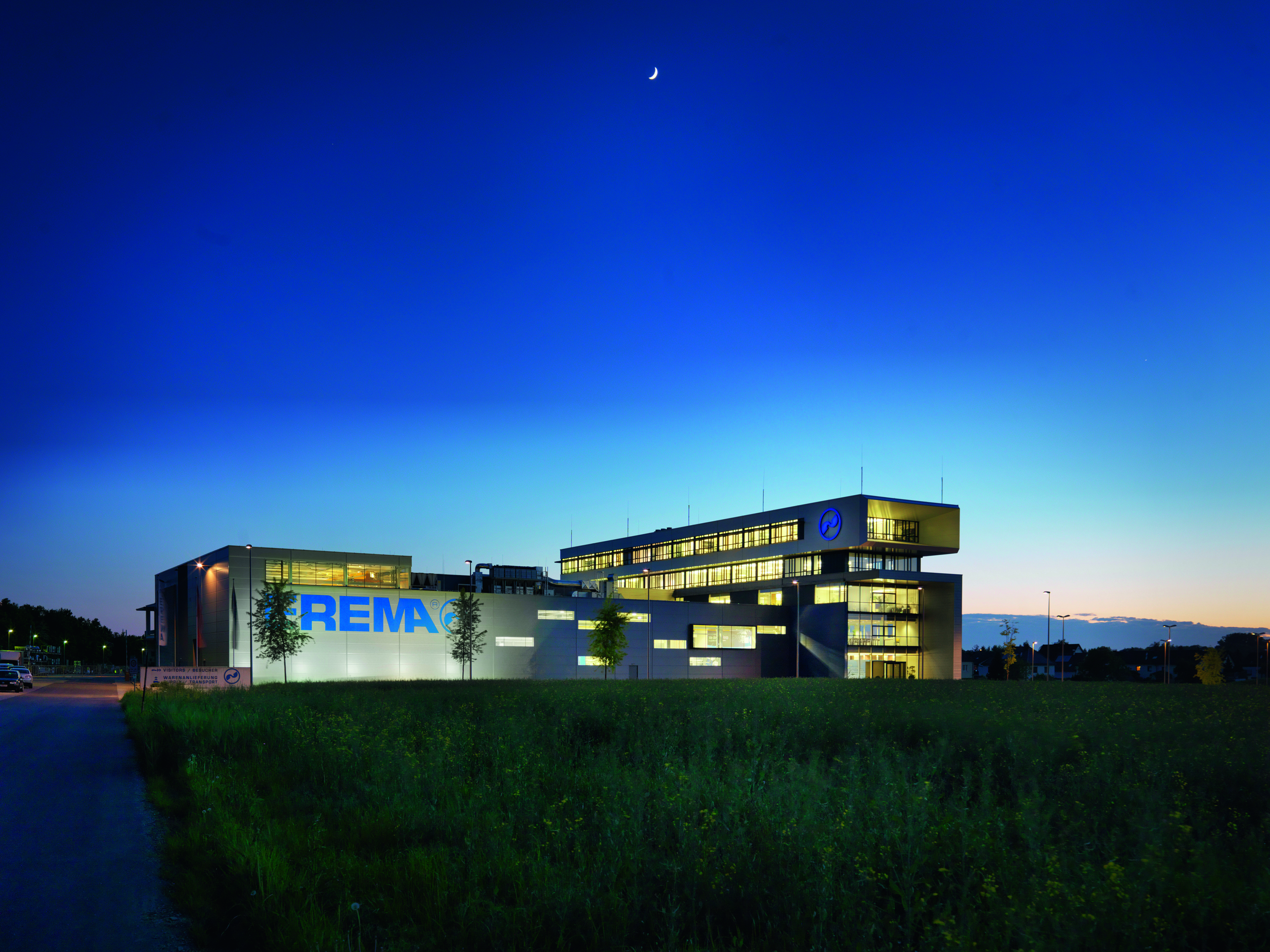 EREMA Firmenhauptsitz bei Nacht